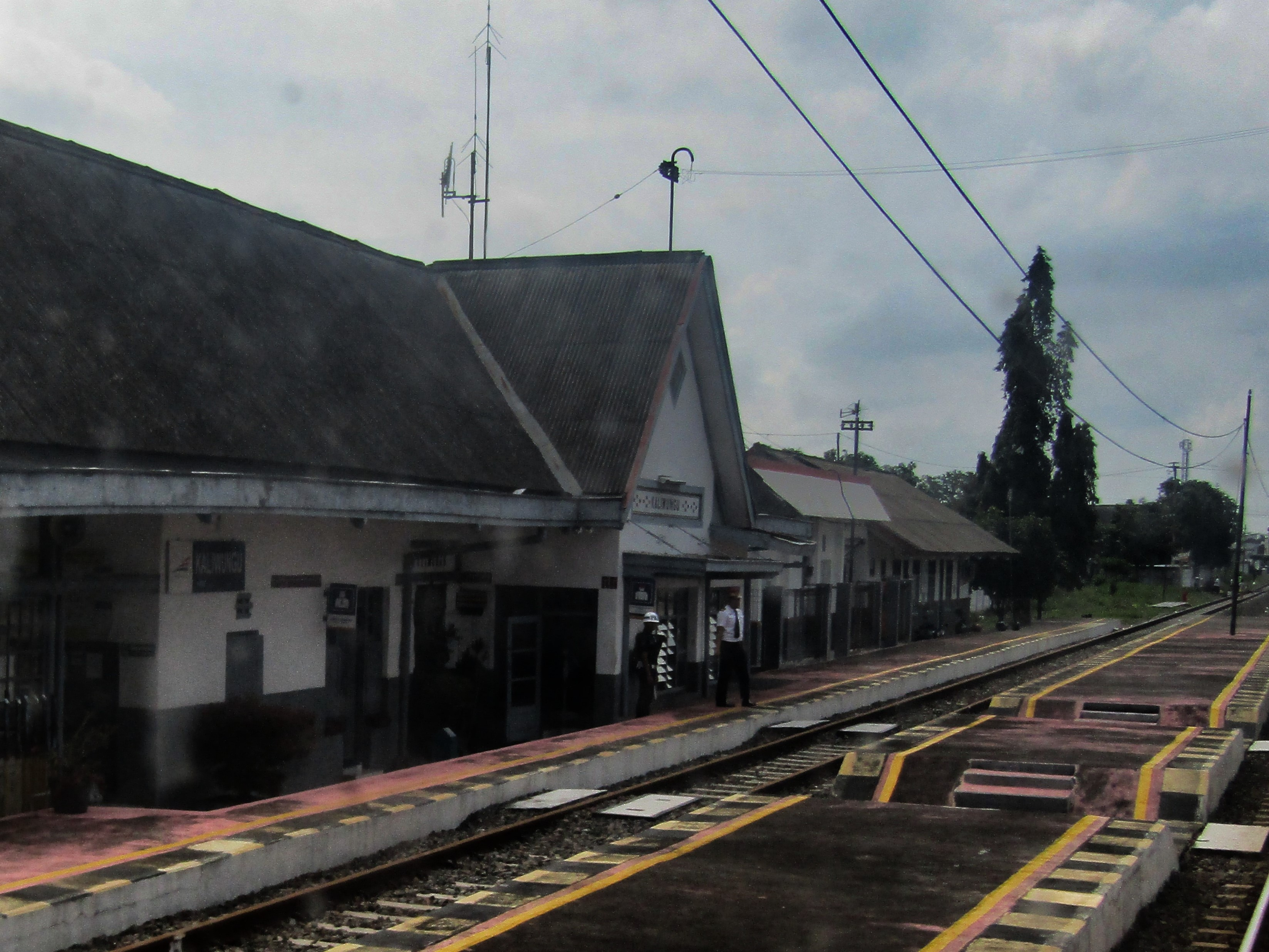 Tampak peron Stasiun Kaliwungu, 2019